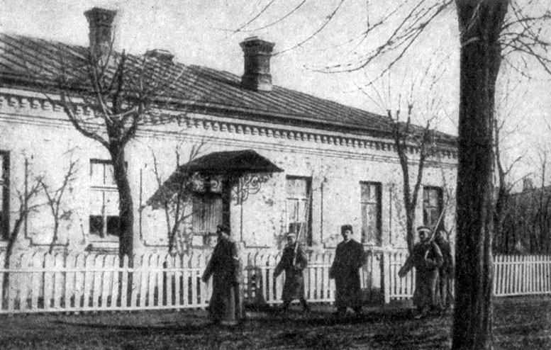 Shmidt_konvoy.jpg: Лейтенанта Шмідта під конвоєм ведуть до суду